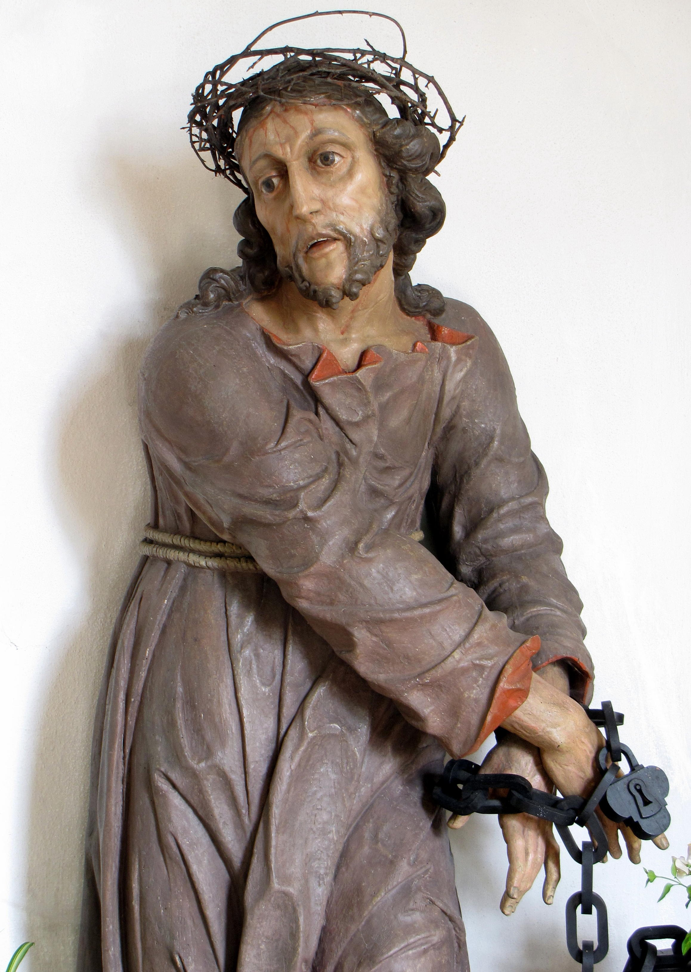 Kerkerheiland von Maximilian Hitzelberger in Pfronten-Kappel